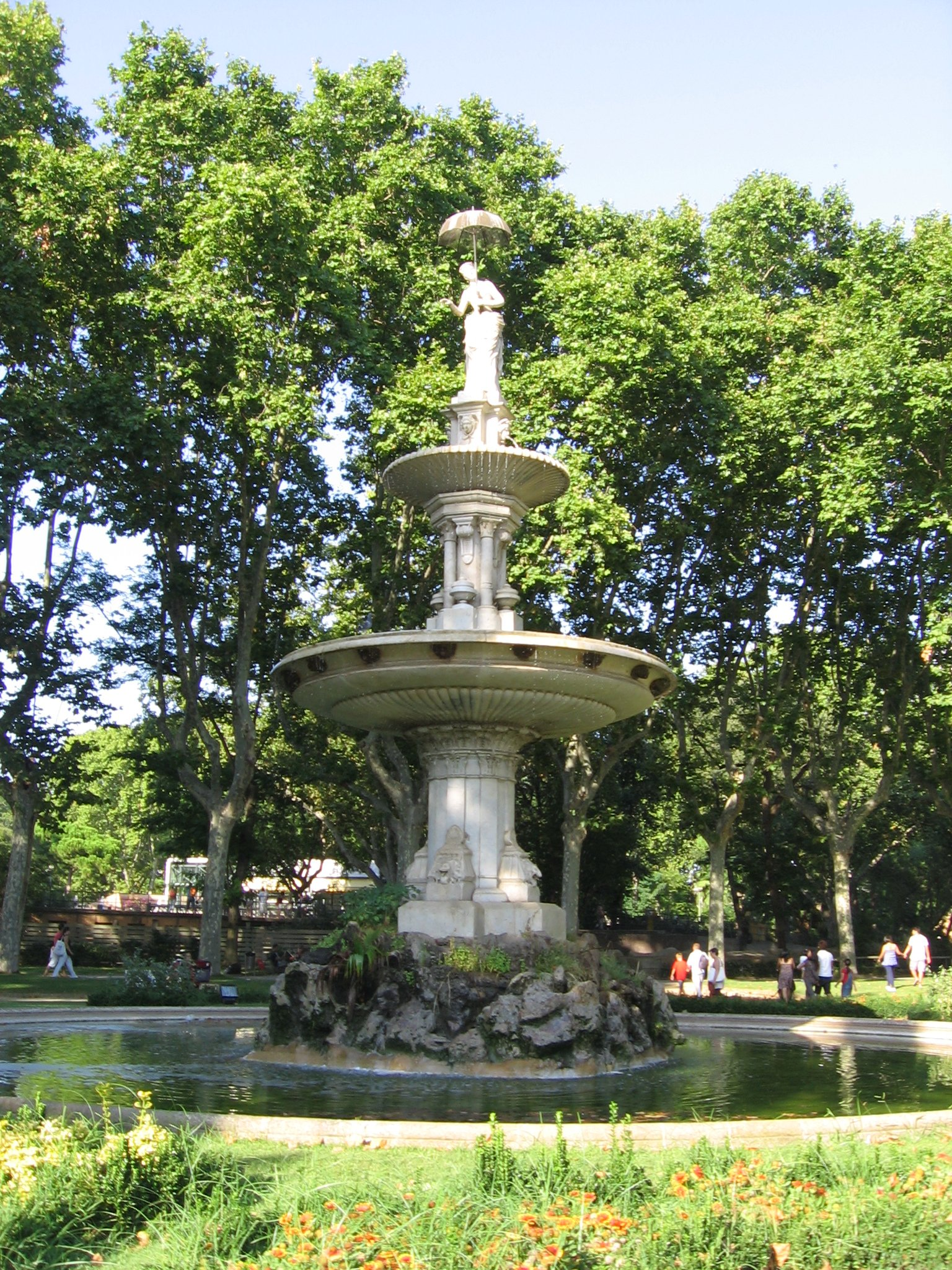 Dama del Paraguas, de Joan Roig i Solé.